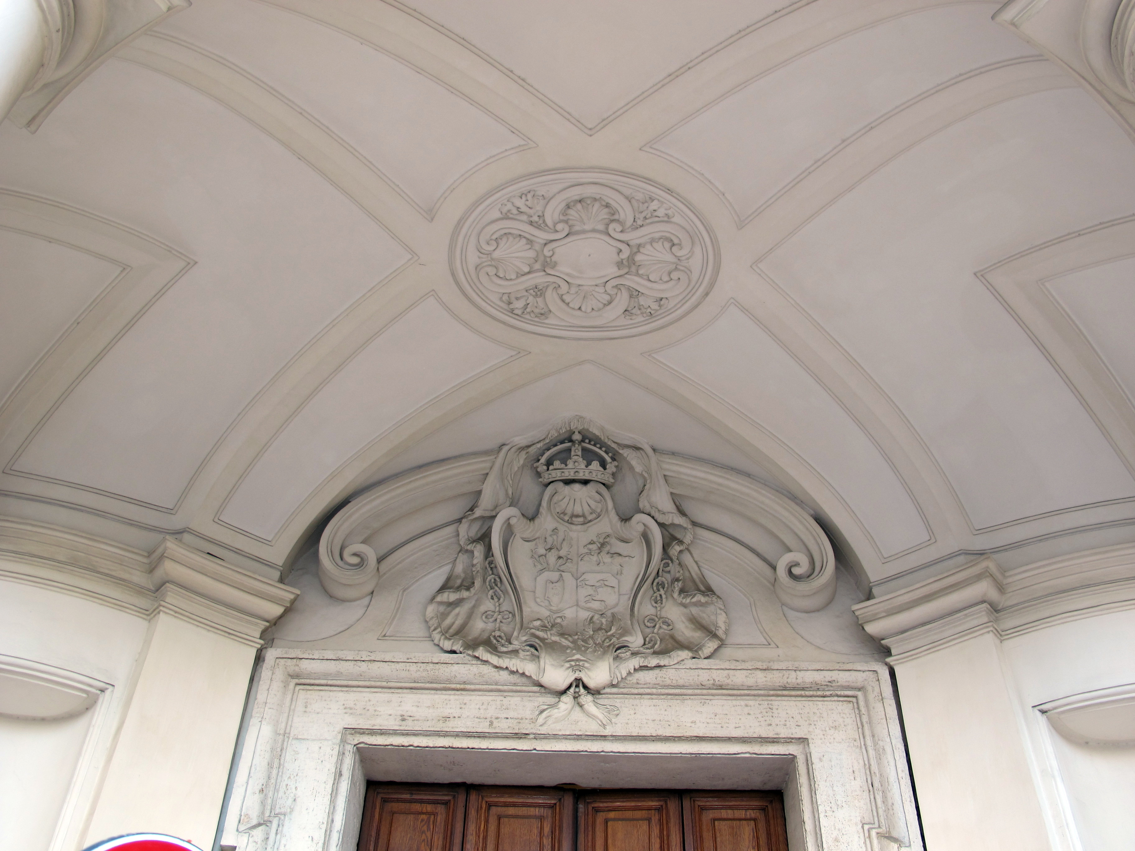 Palazzo Zuccari (Roma)